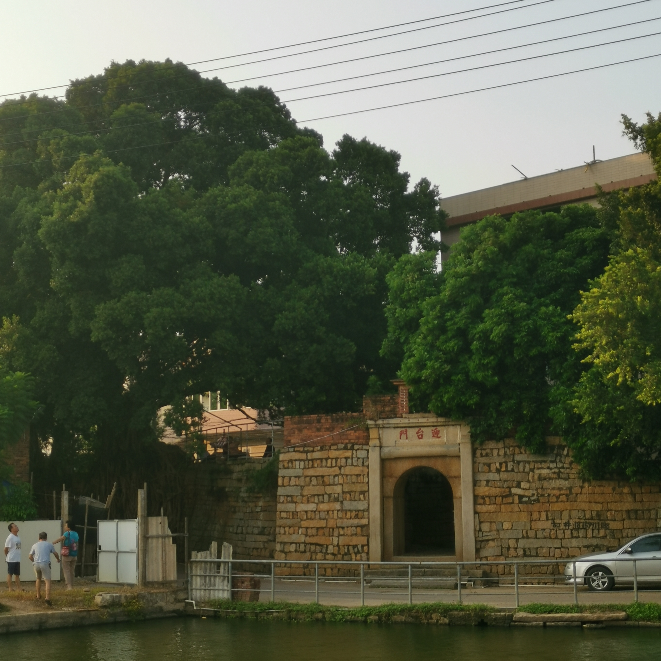 漳州市龙文区朝阳镇楼内村